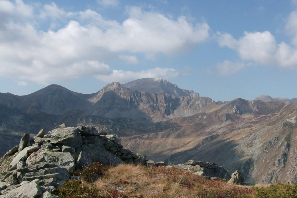 Il monte Mongioie visto dalla cresta est del Pizzo di Ormea